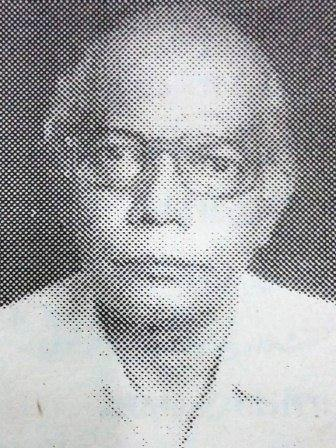 عبد الرب عرفان